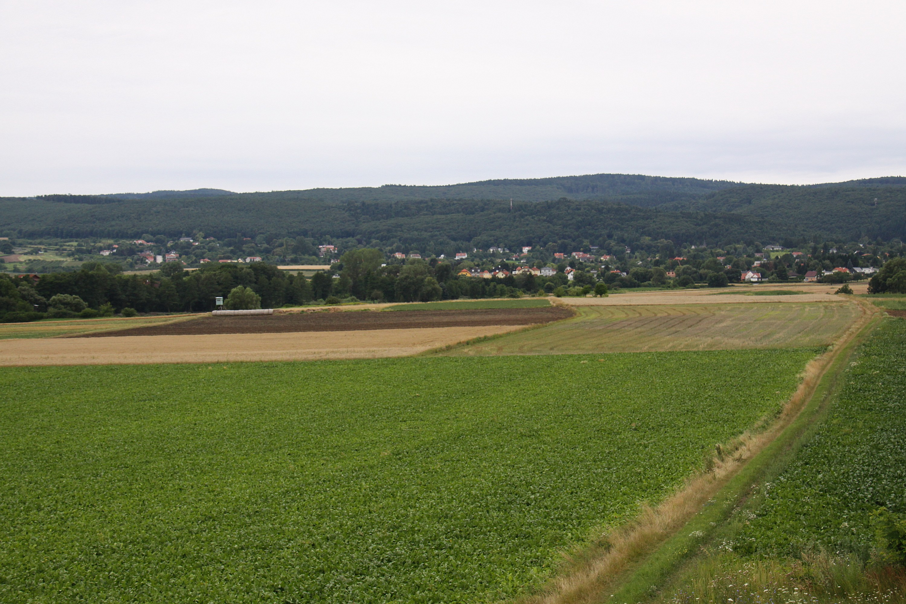 Denkmalgeschützte Fundzone Edeltal in Pöttsching. Object location47° 46′ 43.9″ N, 16° 21′ 05.54″ E